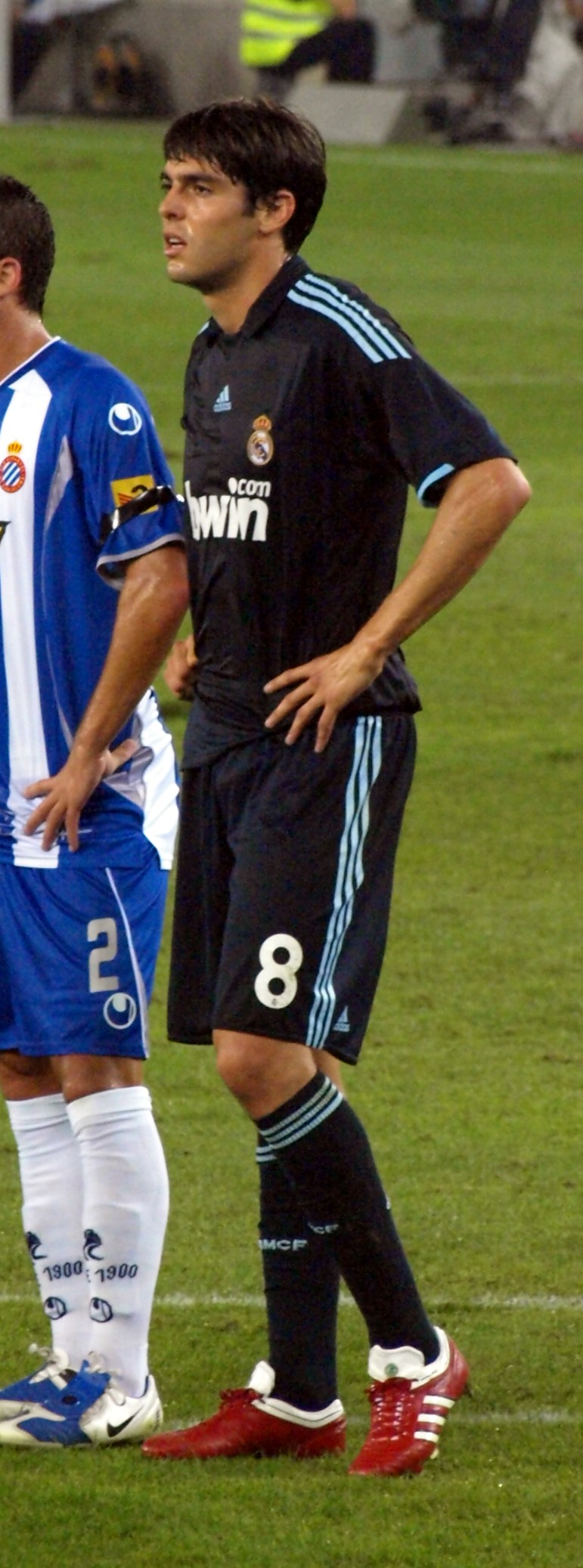 Kaká en el partido que enfrentó al Real Madrid con el RCD Español en el Estadio de Cornellá-El Prat de la primera vuelta de La Liga 2009/10.